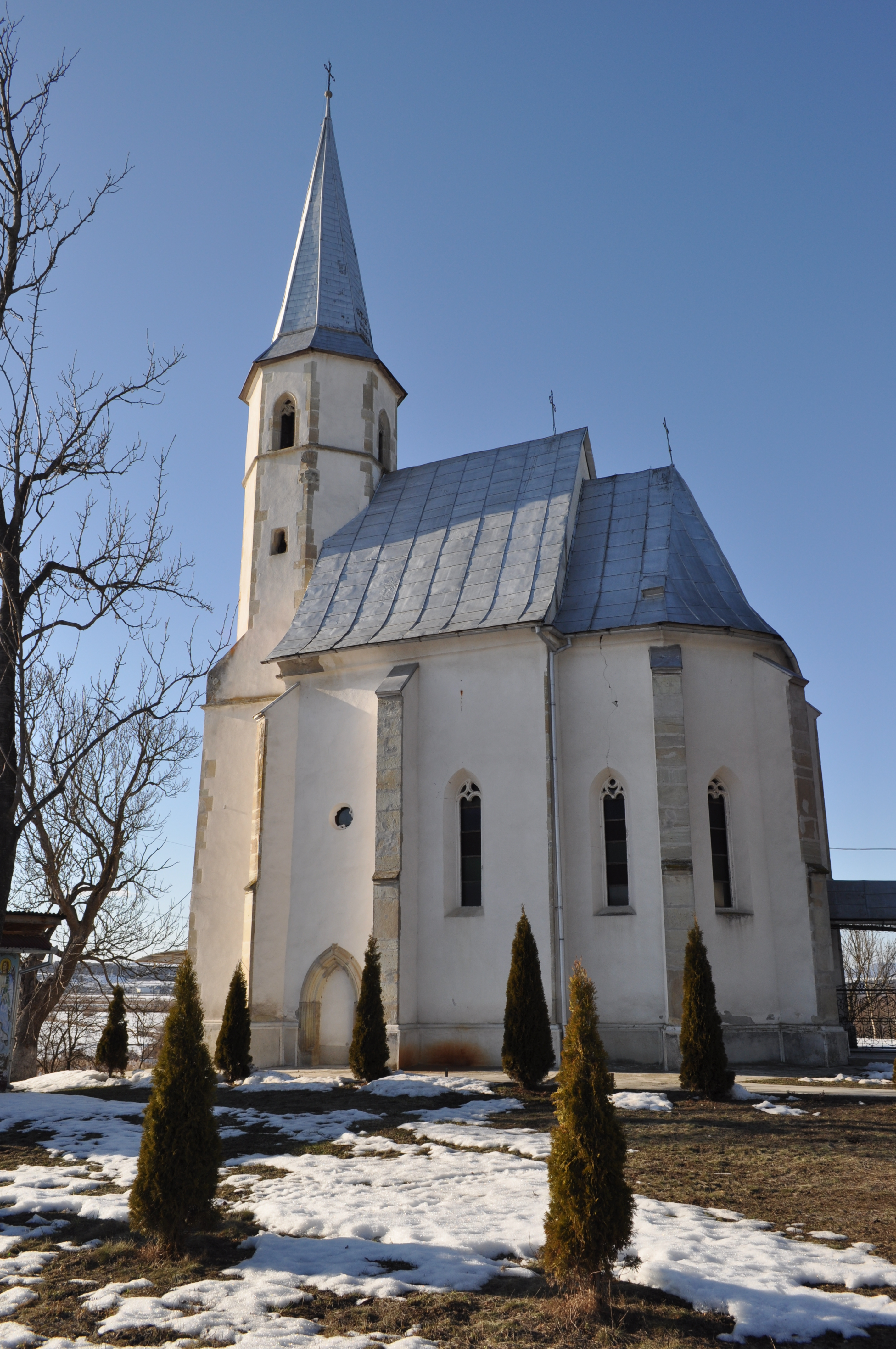 Biserica „Înălțarea Sfintei Cruci” din satul Mănăstirea, județul Cluj